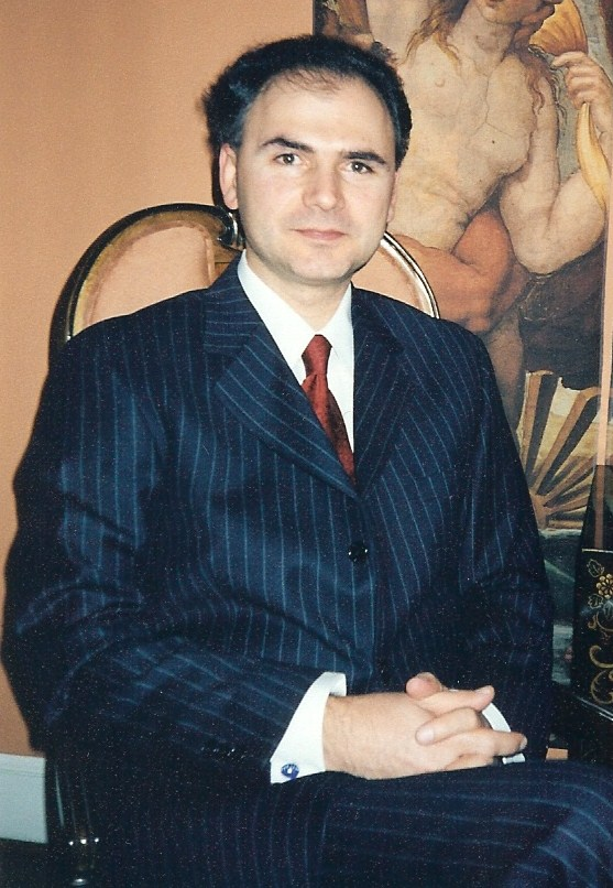 Dejan Stojanović in Washington, D.C.